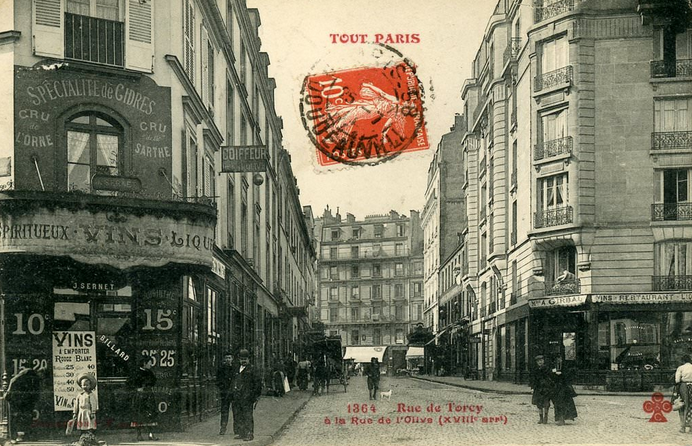 Rue de Torcy. Paris XVIIIè arrondissement.